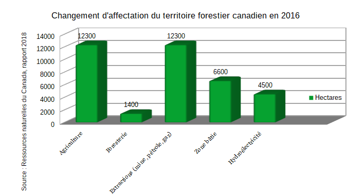 Diagramme établi à partir des données statistiques du site Internet de l'organisme officiel Ministre des Ressources naturelles Canada dépendant du Ministère des ressources naturelles.